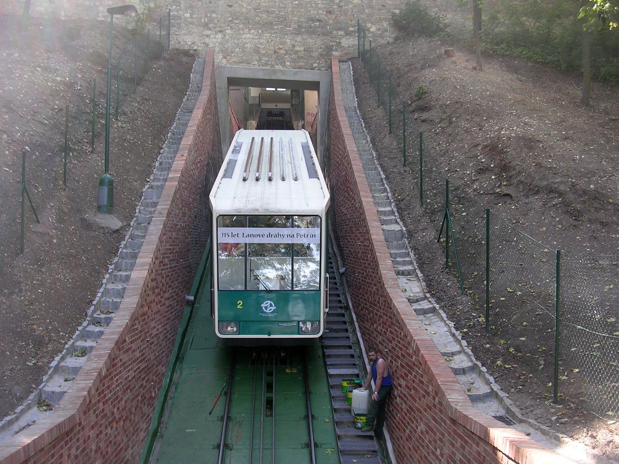 Praha, lanová dráha na Petřín. Průjezd vozu městskými hradbami (Hladová zeď) do stanice Petřín.